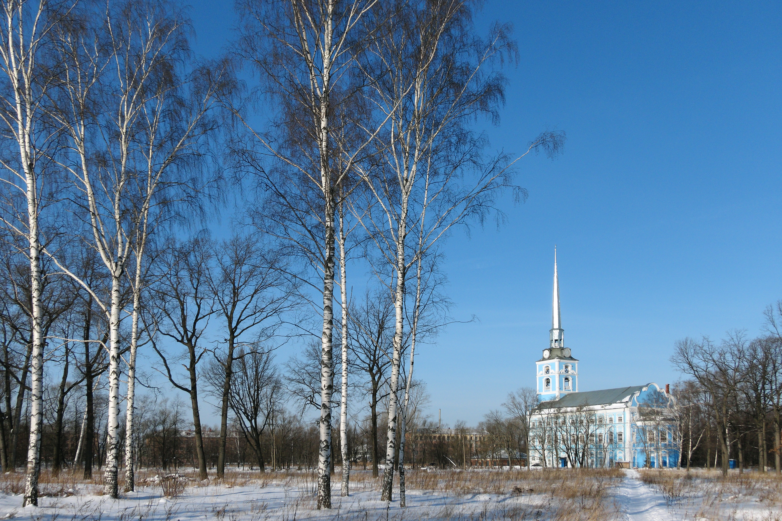 Парк ярославской большой мануфактуры (Ярославская область, Ярославль, зеленцовская улица)